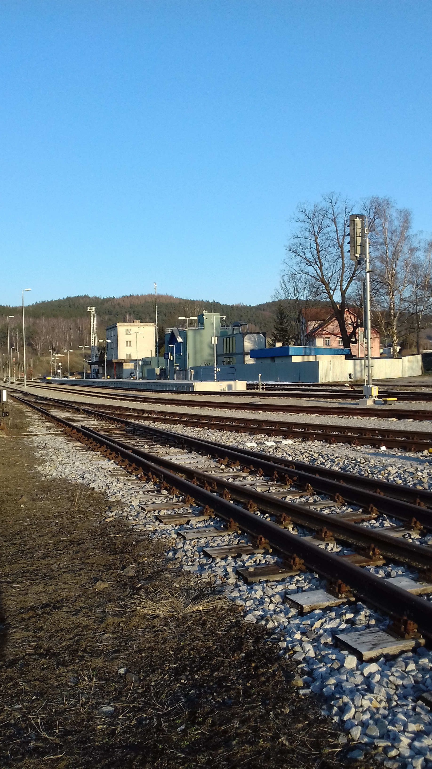 Nádraží v Kájově dnes